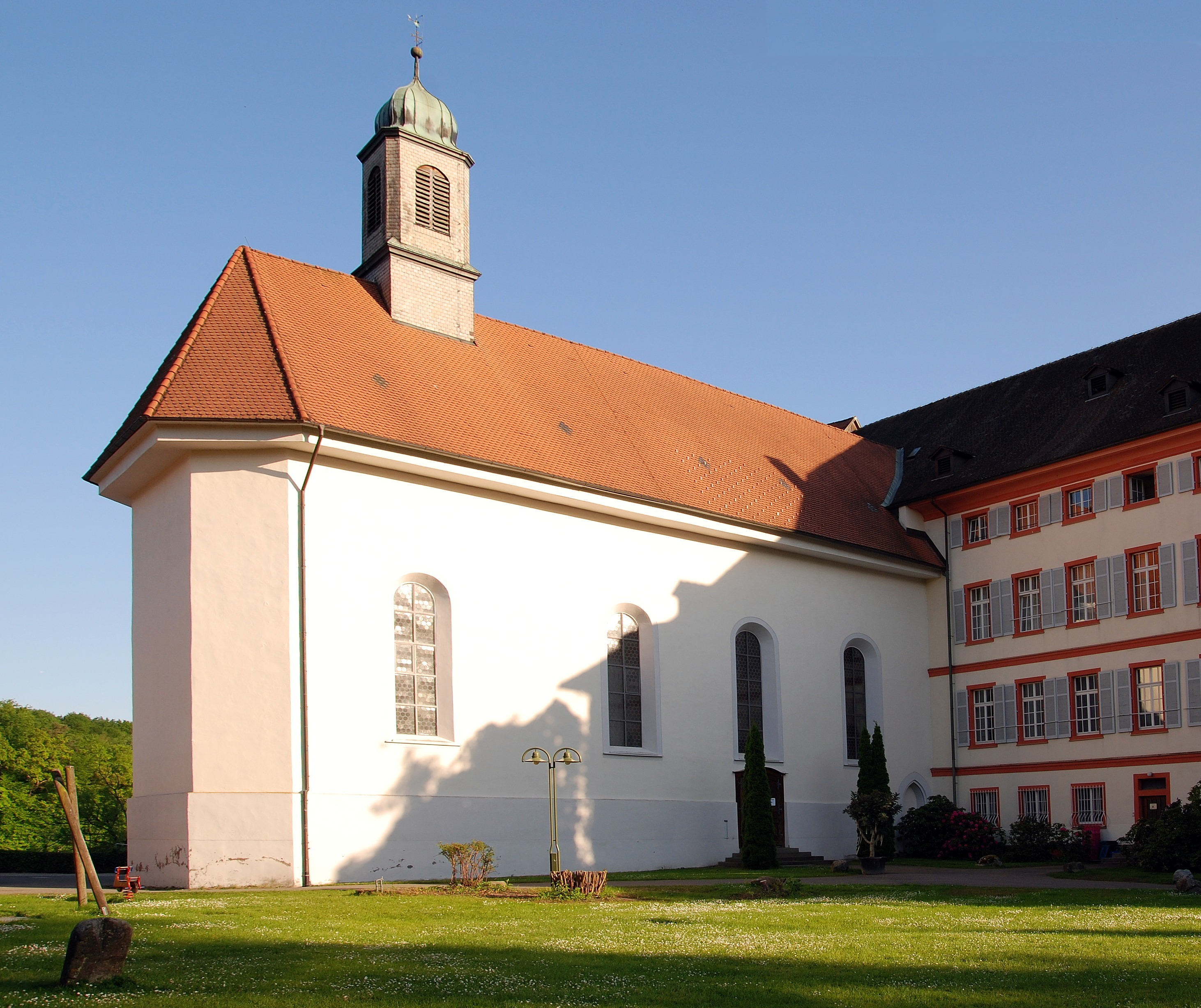 Schloss Beuggen: Schlosskirche. Ganz rechts an der Kirchenfassade erkennt man hinten dem Gebüsch noch die ehemalige gotische Tür, die heute zugemauert ist.